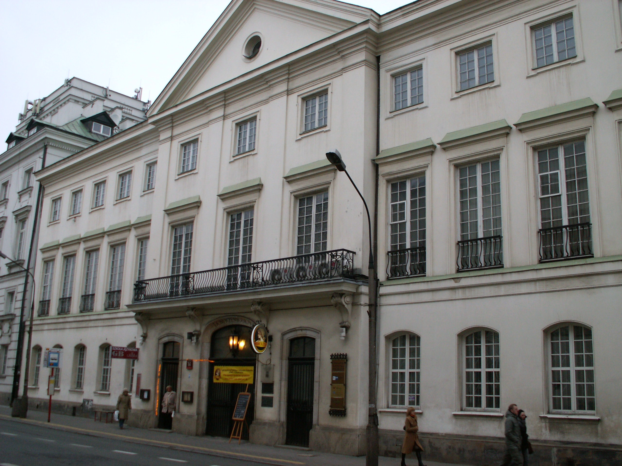 Pałac Chodkiewiczów w Warszawie - dawna siedziba Kerntopfa.